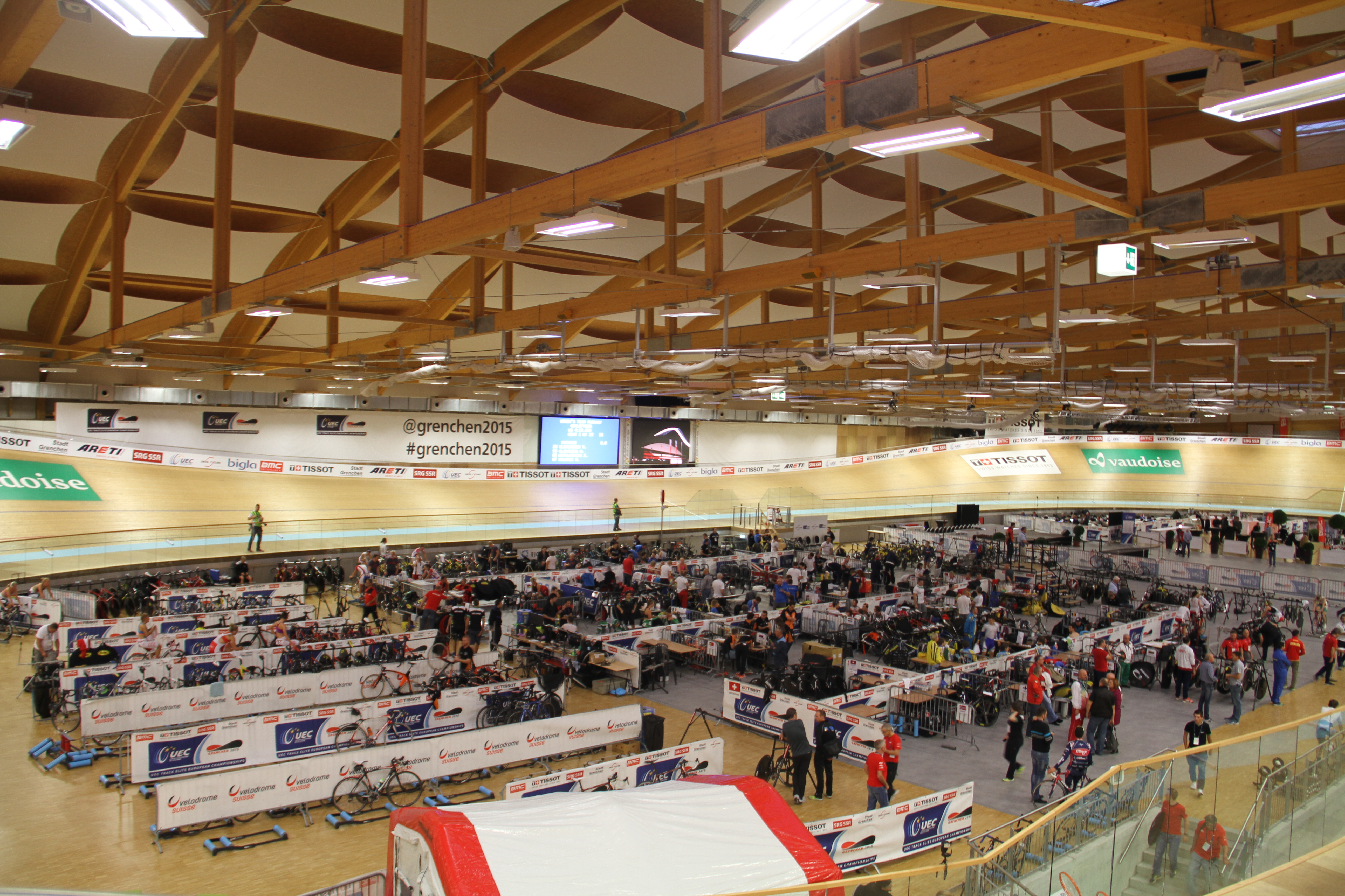 The making of this document was supported by the Community-Budget of Wikimedia Germany.